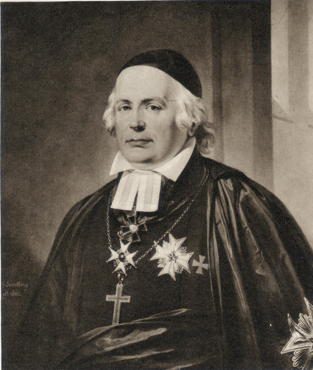 Wilhelm Faxe (1767-1854), biskop i Lund